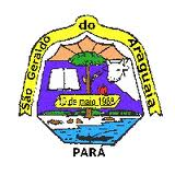 Brasão da cidade de São Geraldo do Araguaia-PA